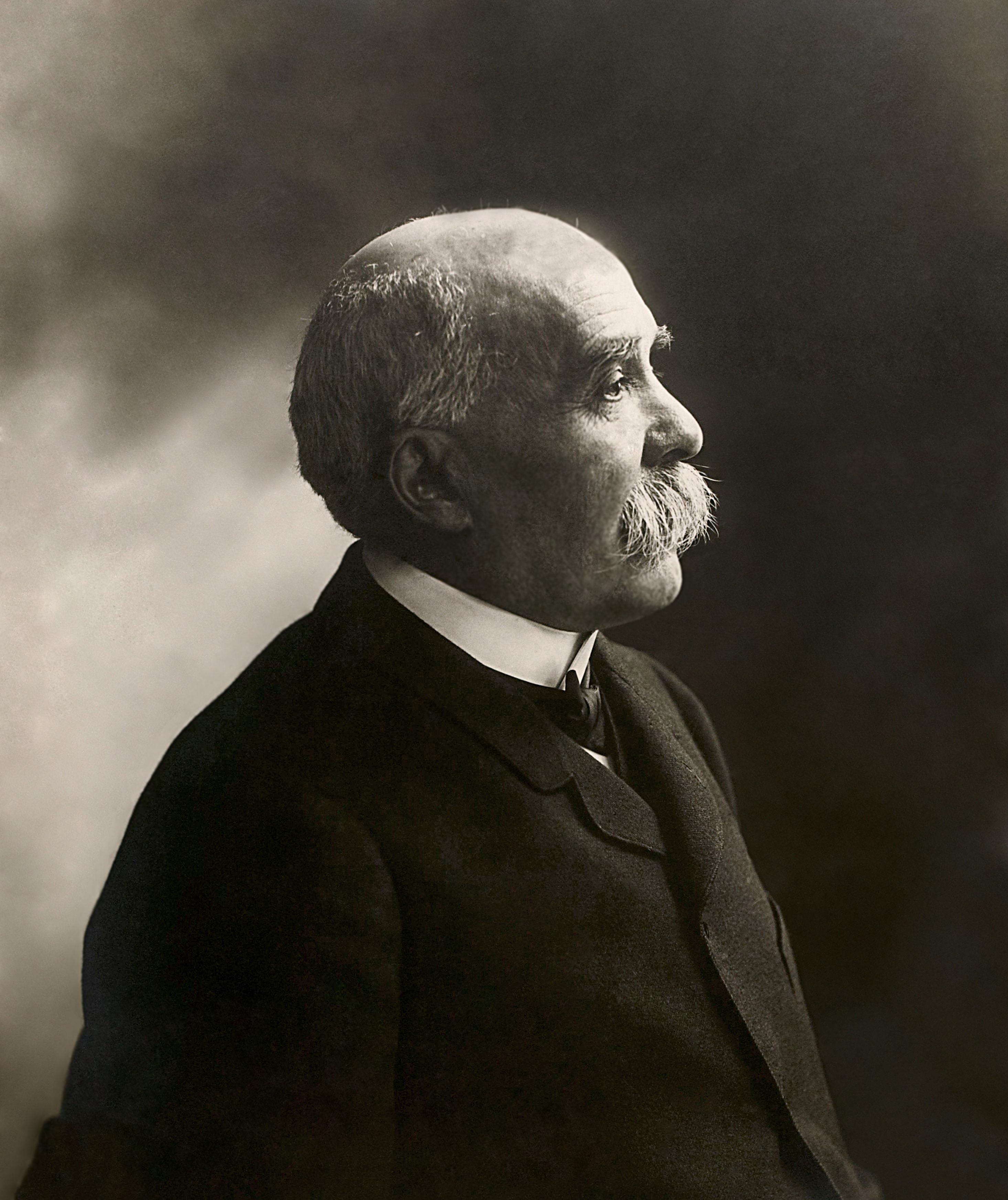 Georges Clemenceau (1841 - 1929).